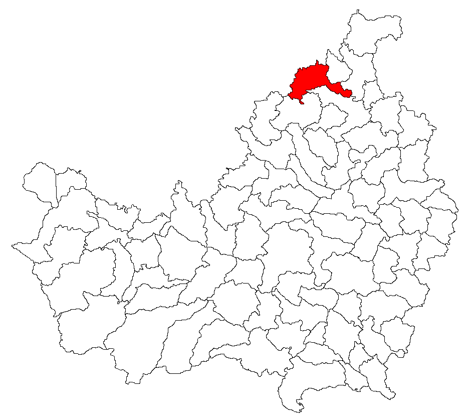 Categorie:Hărţi ale judeţului Cluj